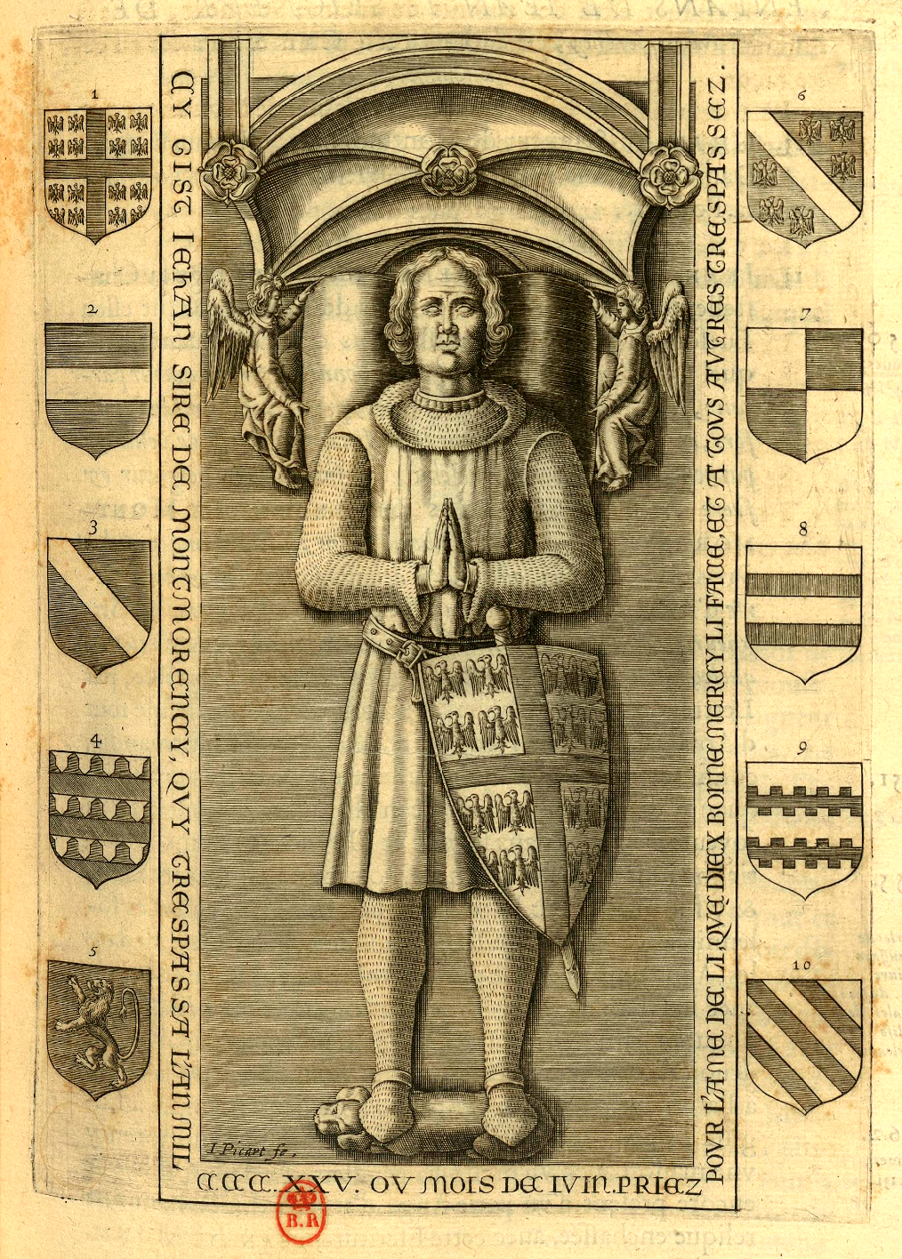 Vu d'en haut du gisant de (prétendu) Jean de Montmorency, avec un encadrement fictif qui ne correspond pas aux dimensions du soubassement conservé au musée de la batellerie de Conflans-Sainte-Honorine (78) et qui apparaît sur un relevé de l'architecte Jules Formigé. En réalité, il ne restent que 19 cm de libres au-dessus de la tête. Le gisant seul mesure 195 cm de longueur.